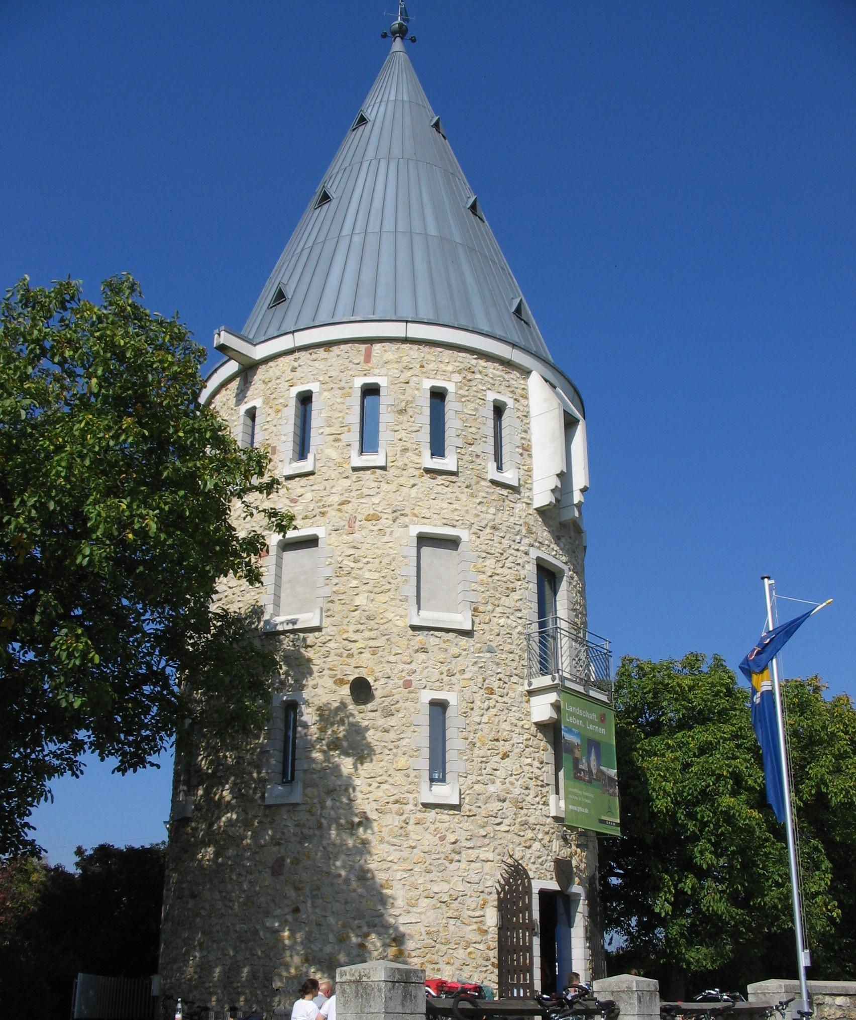 Die Flörsheimer Warte wurde im Jahr 1996 für den Regionalpark RheinMain nach einem Wachtturm aus dem 15. Jahrhundert rekonstruiert, einem von vier Türmen, die Teil der zum Grenzschutz dienenden Landwehr waren. Diese Grenzanlage sollte Die Nordgrenze des kurmainzischen Territoriums von Kastel, Kostheim, Hochheim und Flörsheim sichern helfen.